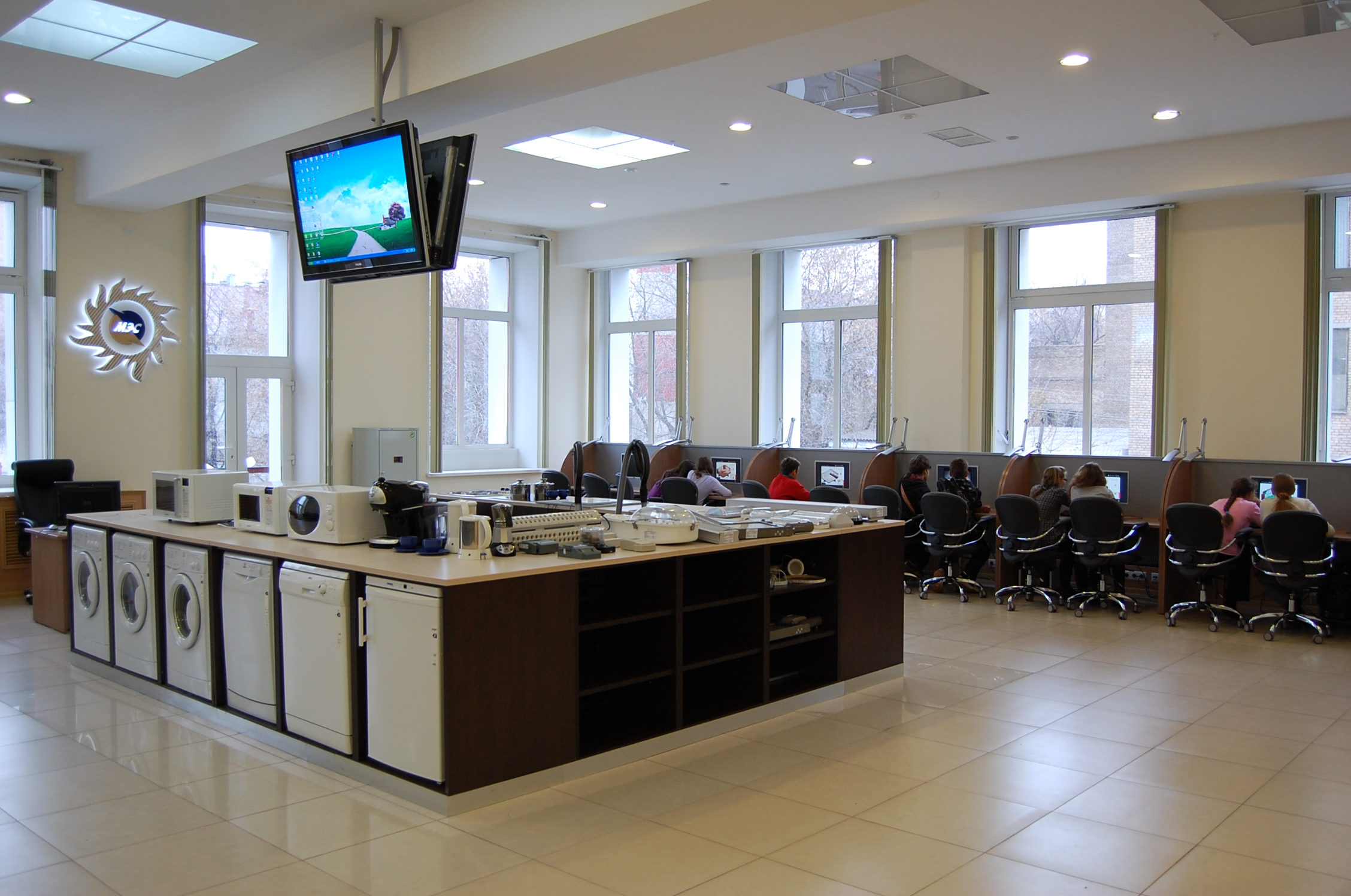 Первый в России Центр по энергосбережению. ОАО "Мосэнергосбыт"